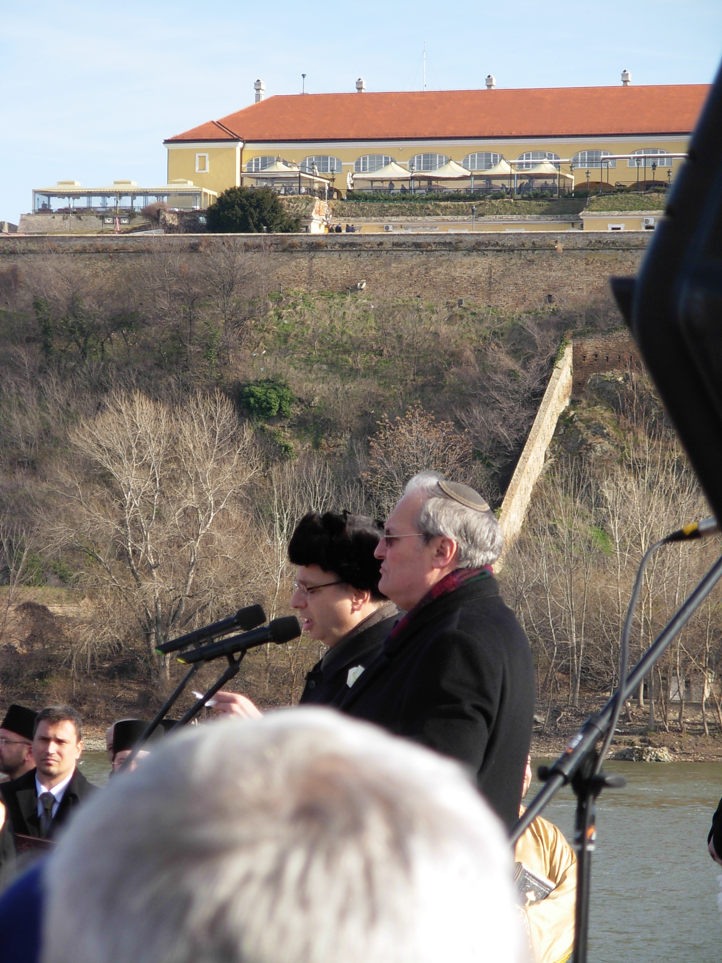 Predstavnici jevrejske zajednice na obeležavanju 70. godišnjice Novosadske racije: direktor centra Simon Vizental u Jerusalimu, Efraim Zurof, i vrhovni rabin Jevrejske zajednice Srbije, Isak Asiel.